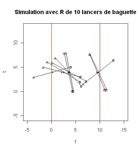 Résultat d'une simulation en langage R